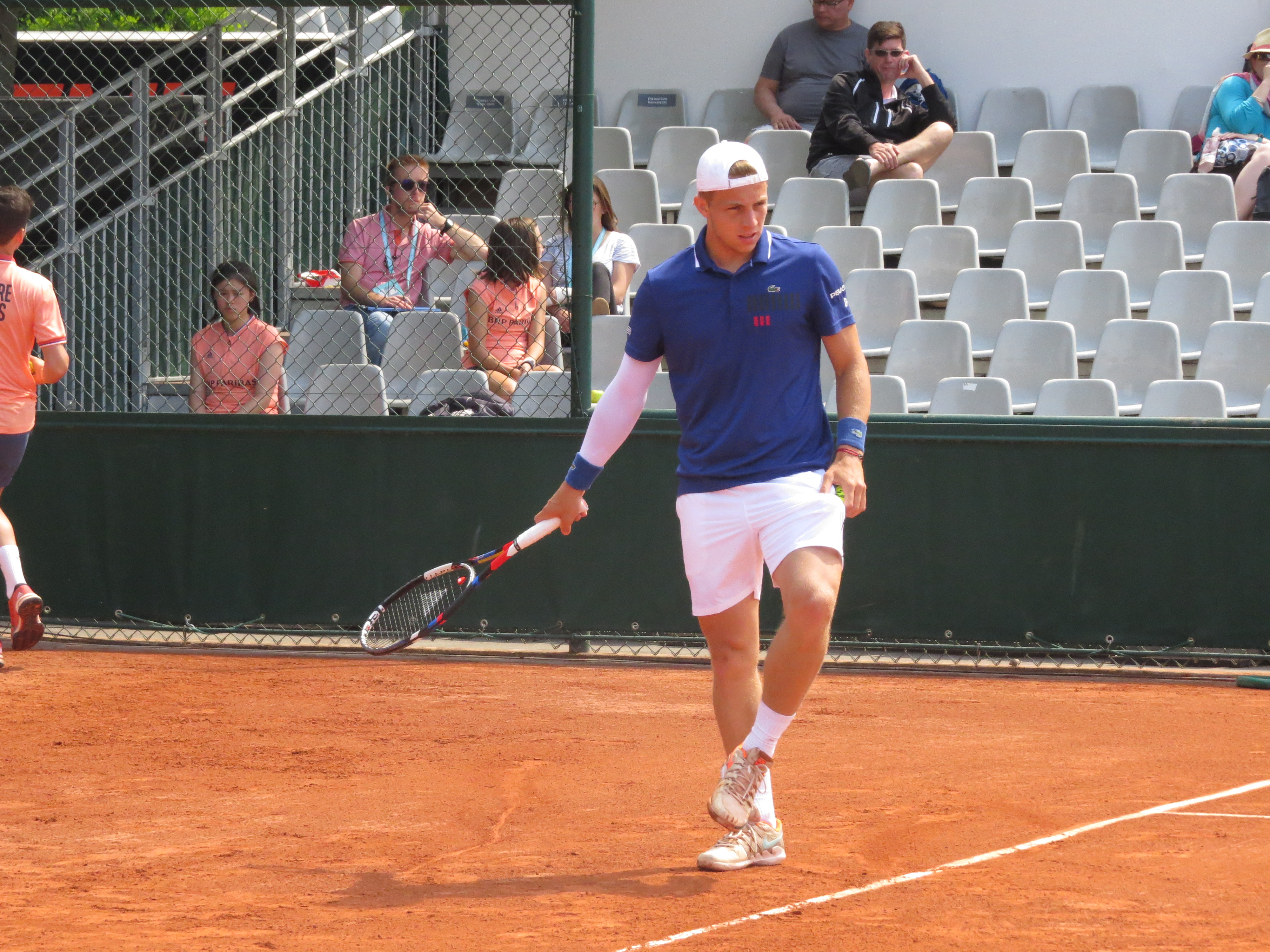 Tallon Griekspoor lors de son premier tour des qualifications face à Reilly Opelka (court n°6).